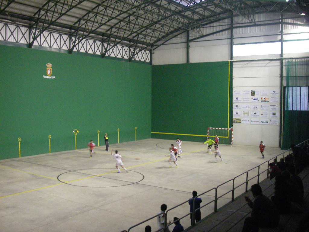 Vista del polideportivo de Entrena durante el partido Villa de Entrena - Inter Rioja 2000